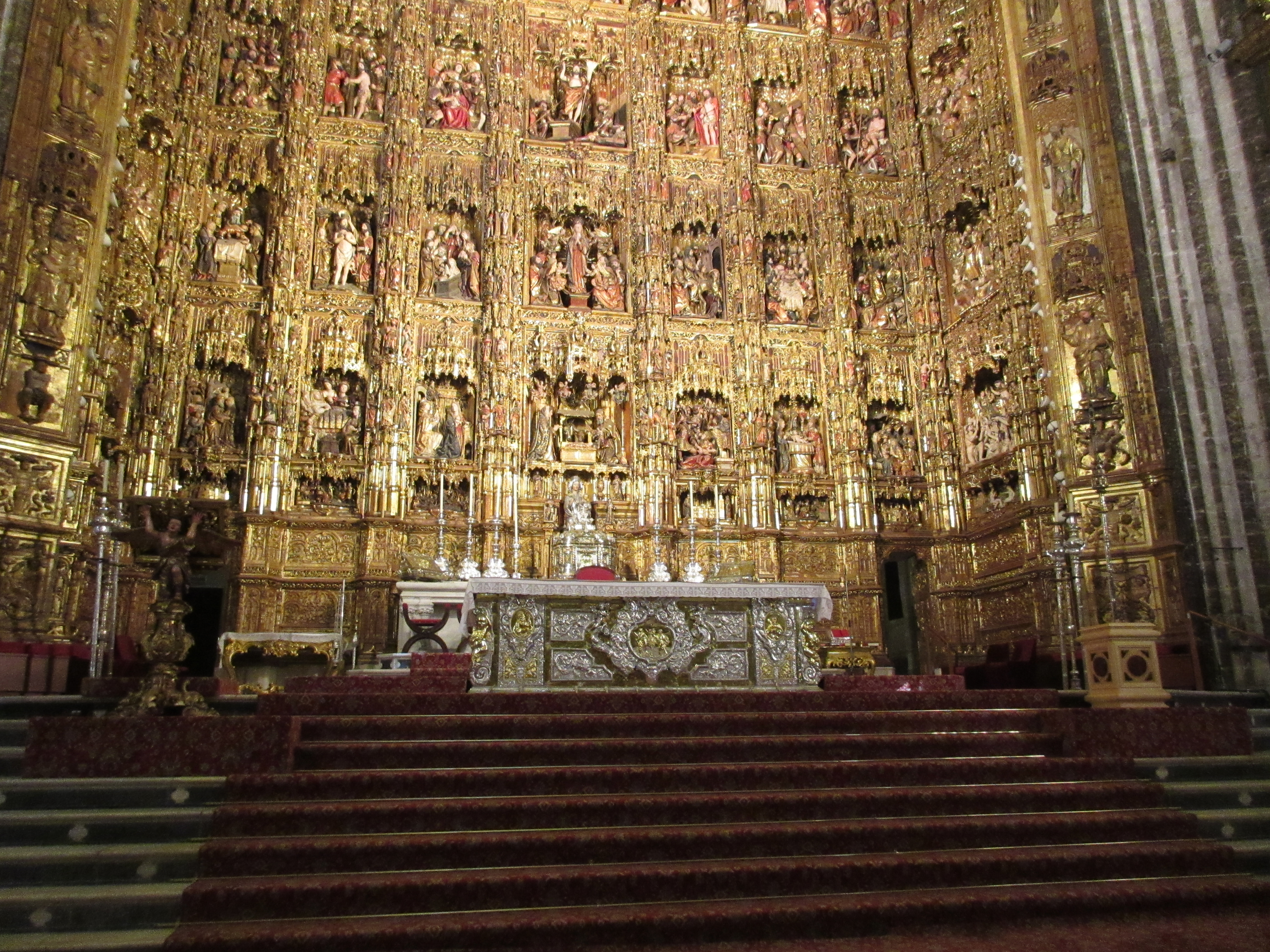 Vista general del altar y del cuerpo inferior del retablo mayor de la catedral de Sevilla, (España).